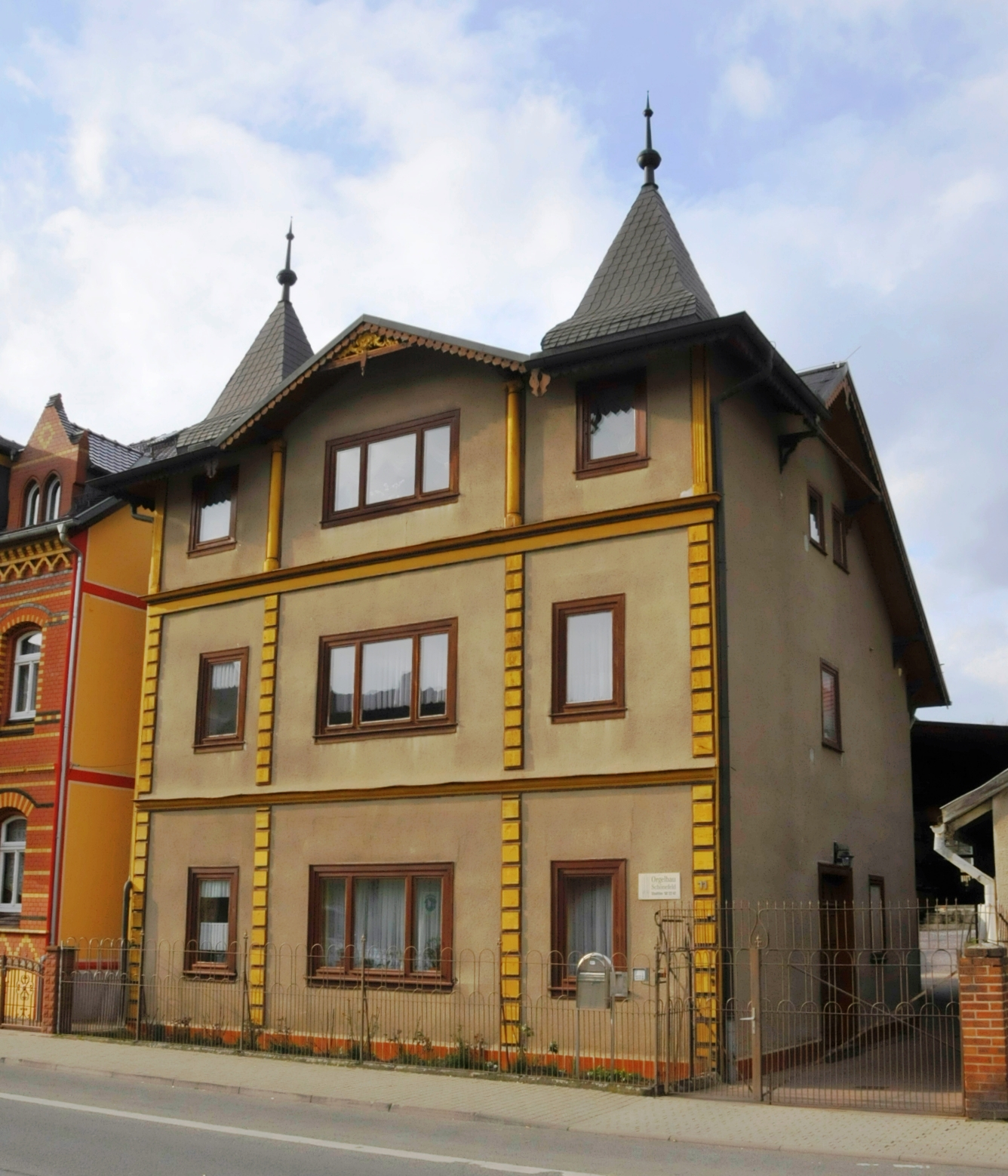 Haus des Orgelbauers Schönefeld in Stadtilm